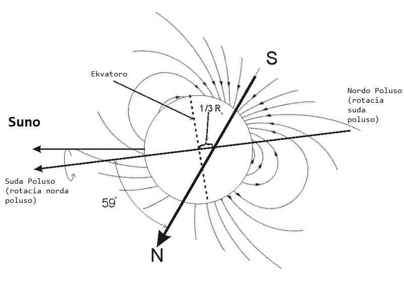 Cxi tiu bildo montras la magnetan kampon de Urano, kiel vidita laux Voyager 2 je 1986. La bildo de dupoluso el Vikimedia Komunoj estis uzita. Cxi tiu bildo estis kreita el angla speco de cxi tia bildo, por la Urana artiklo.